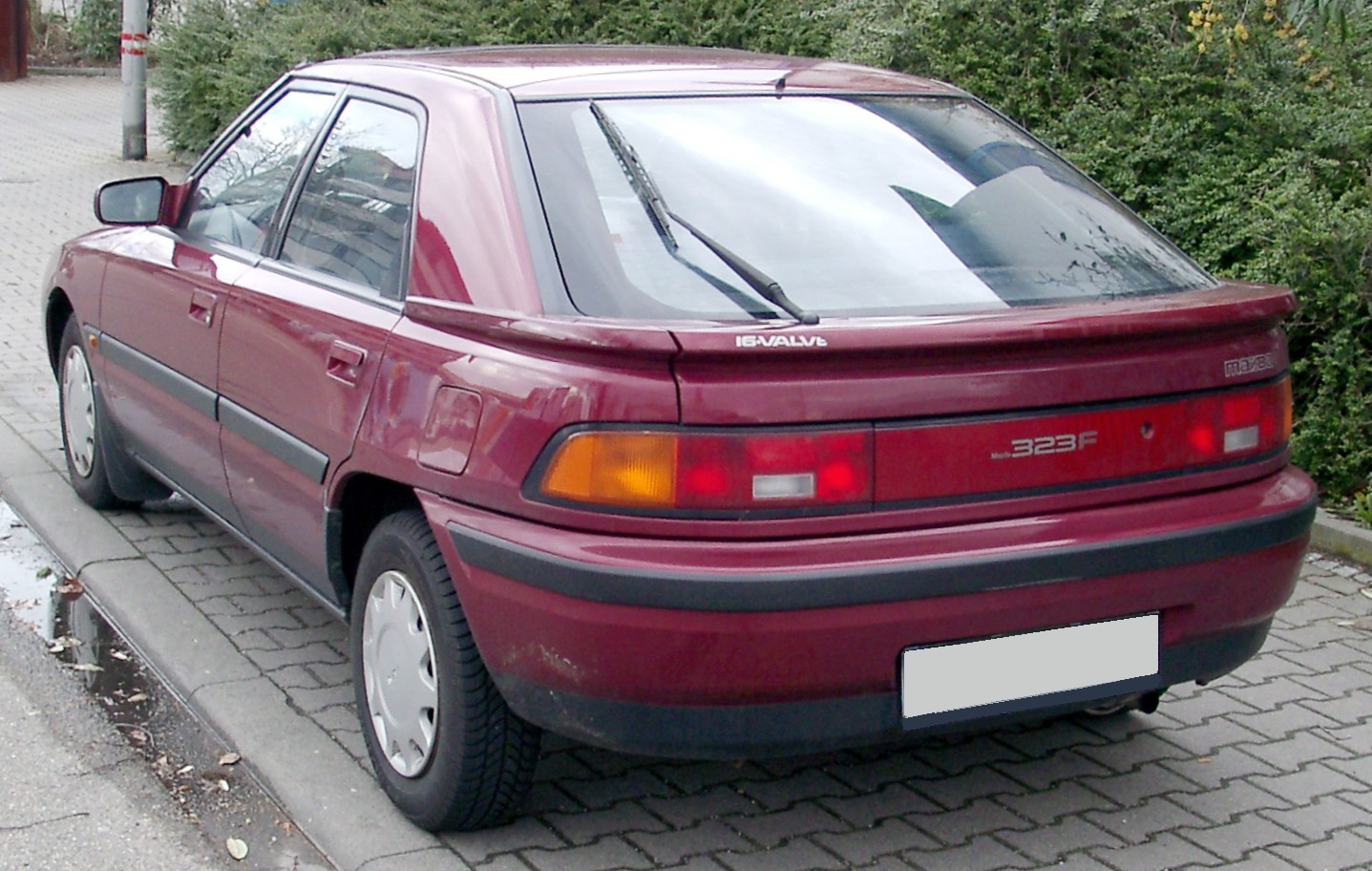 Mazda 323 f